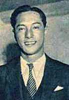 二出川延明（野球殿堂表彰者）